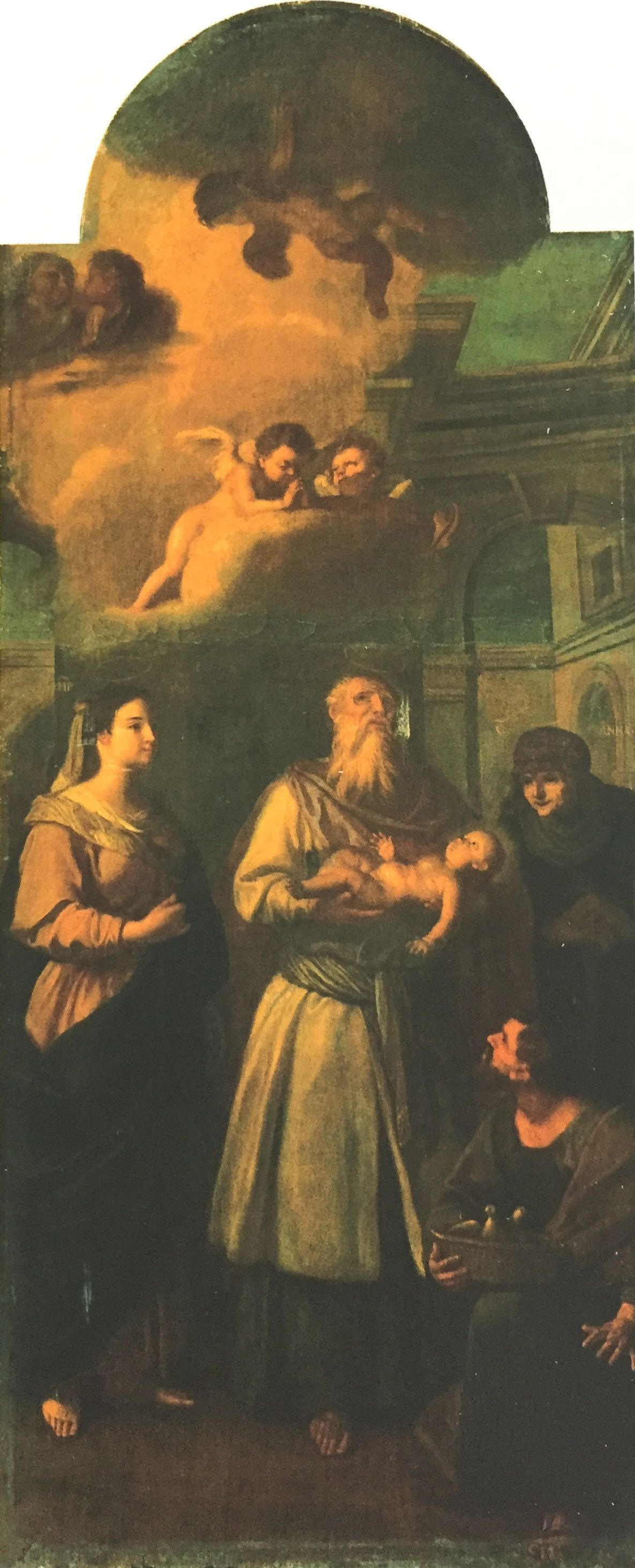 Сретение Господне (икона малой церкви Зимнего дворца, сохранившаяся после пожара 1837 года)